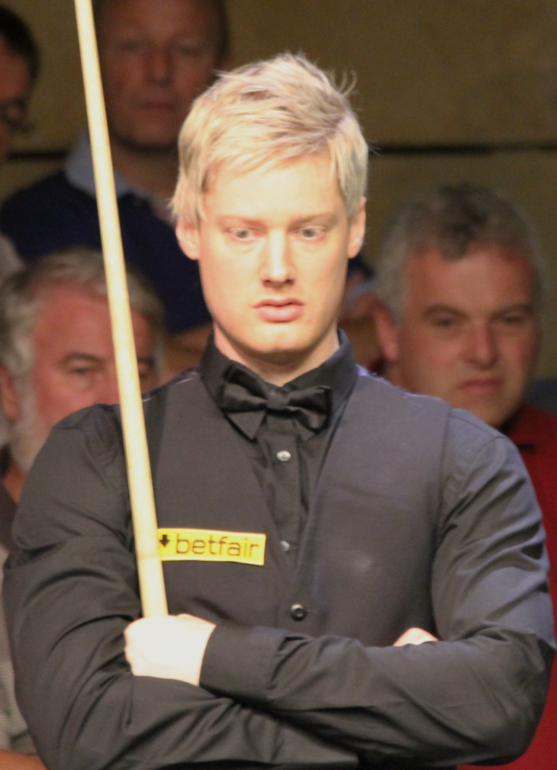 Neil Robertson beim Paul Hunter Classic 2012